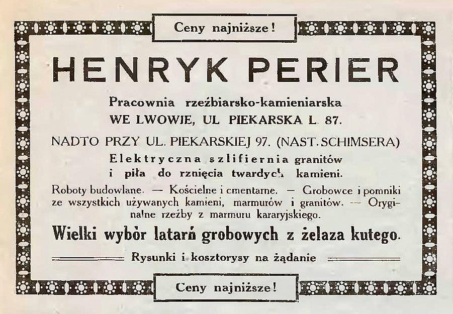 Ogłoszenie z 1914 we Lwowie. Rzeźbiarz Henryk Karol Perier.